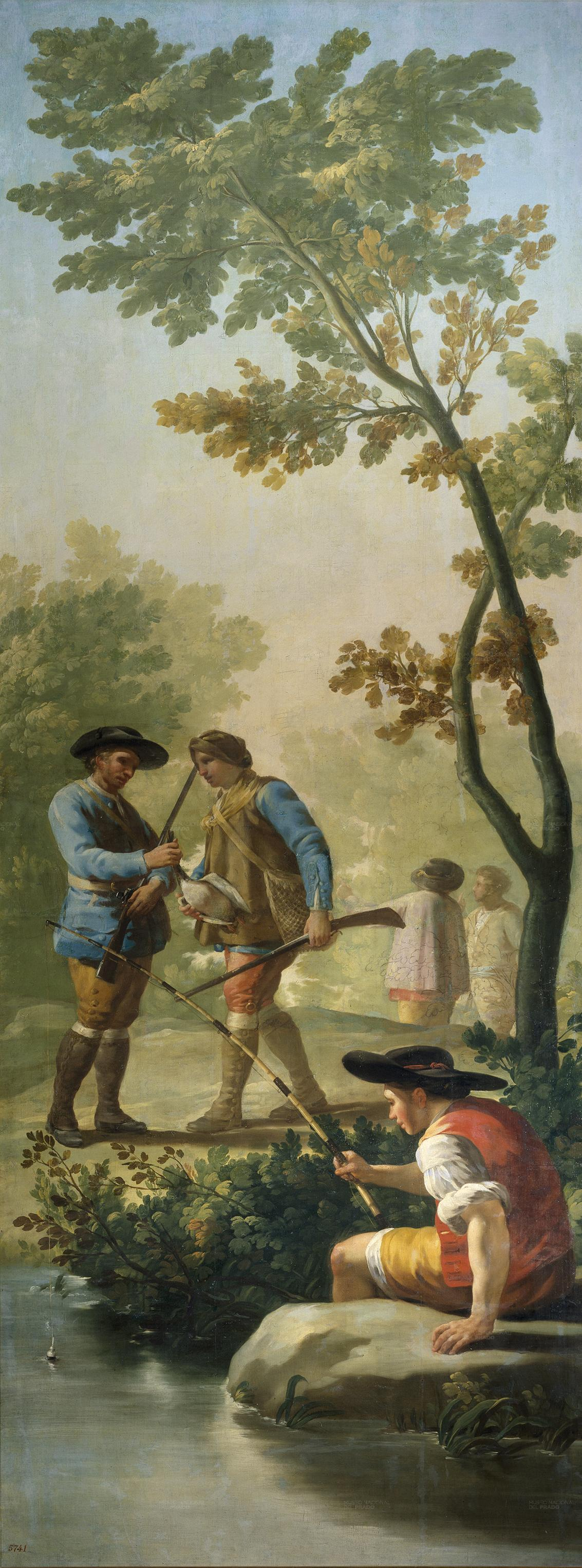 Cartones para tapices.